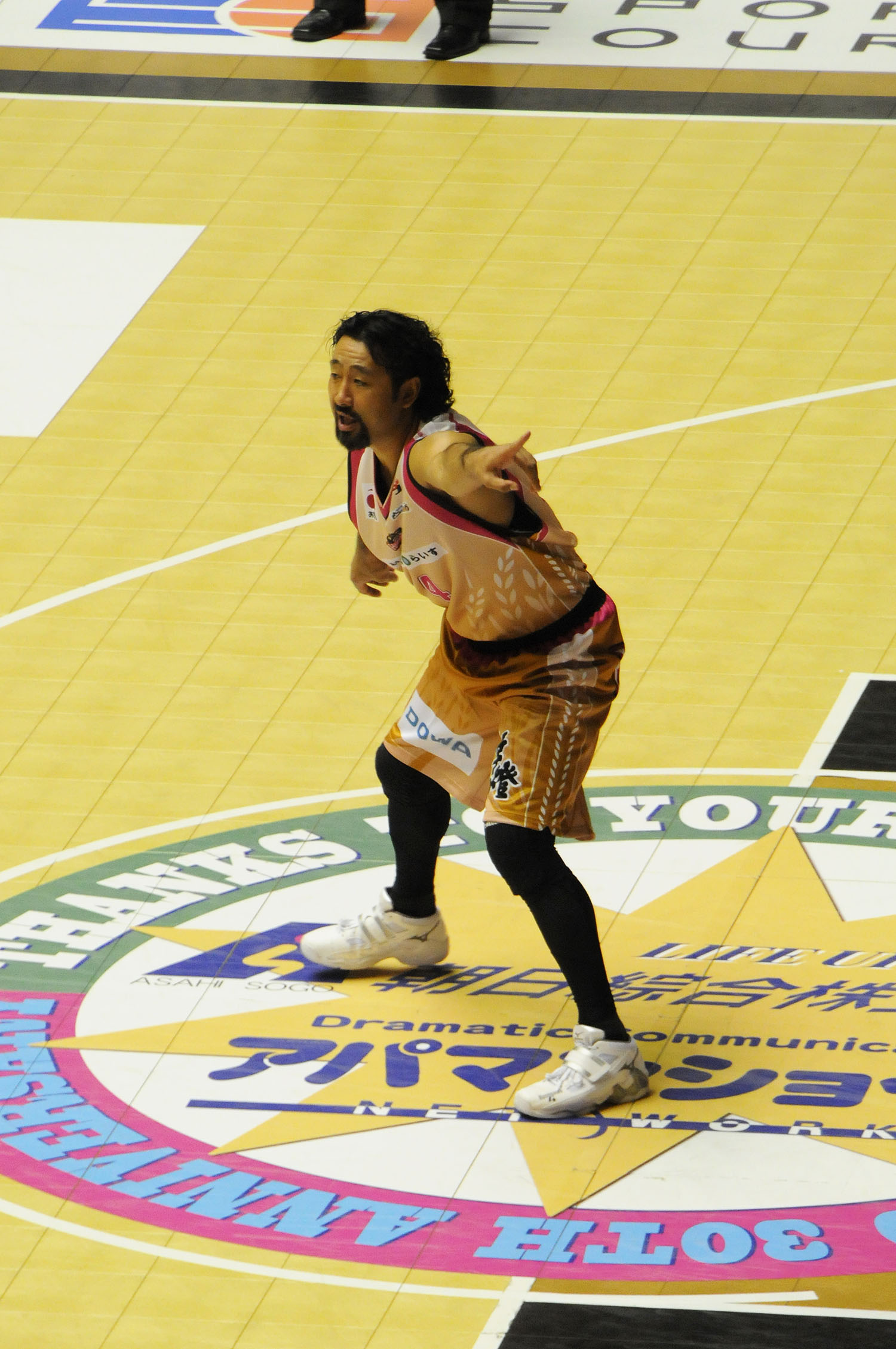 秋田ノーザンハピネッツ、長谷川誠選手。秋田県立体育館で。